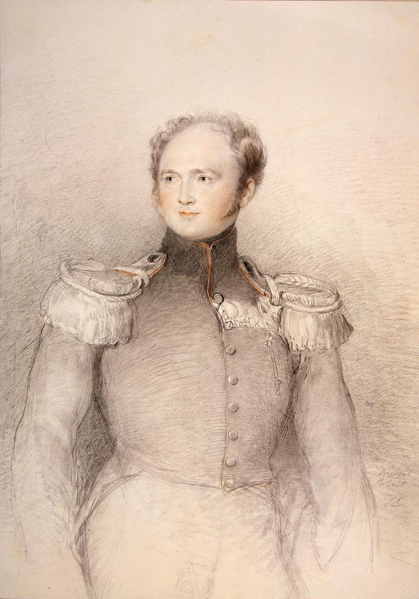 Портрет императора Александра I